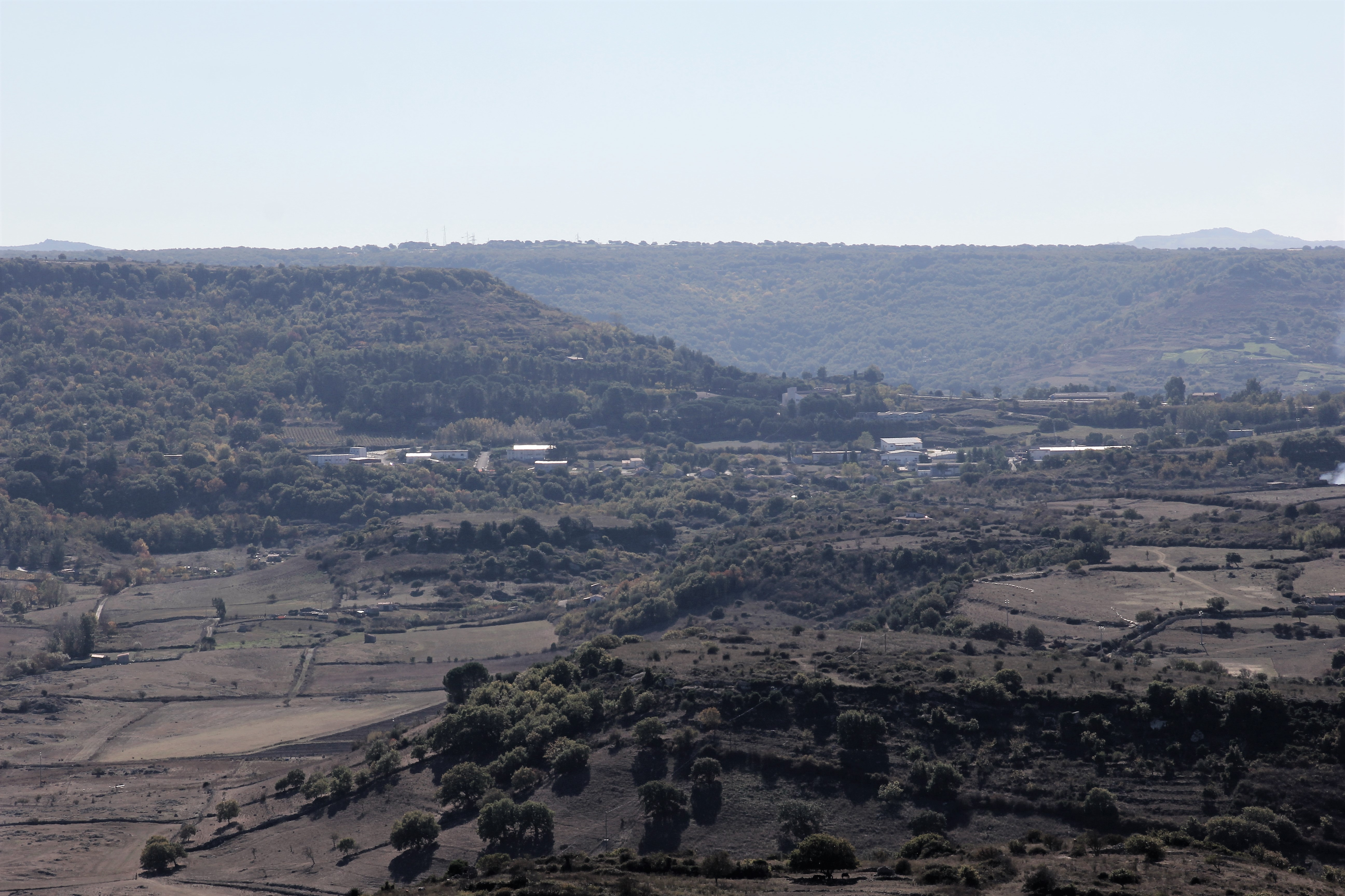 Bonorva, frazione Santa Barbara